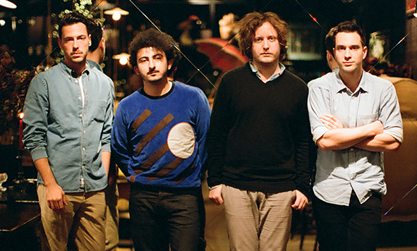 Pompeya (band)